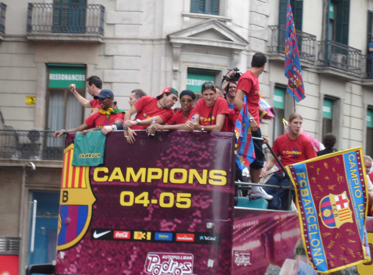 Celebración del título de Liga de Primera División de España 2004-2005, por el FC Barcelona. (rua)